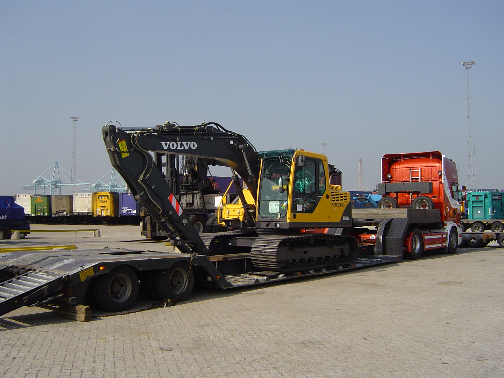 Dieplader